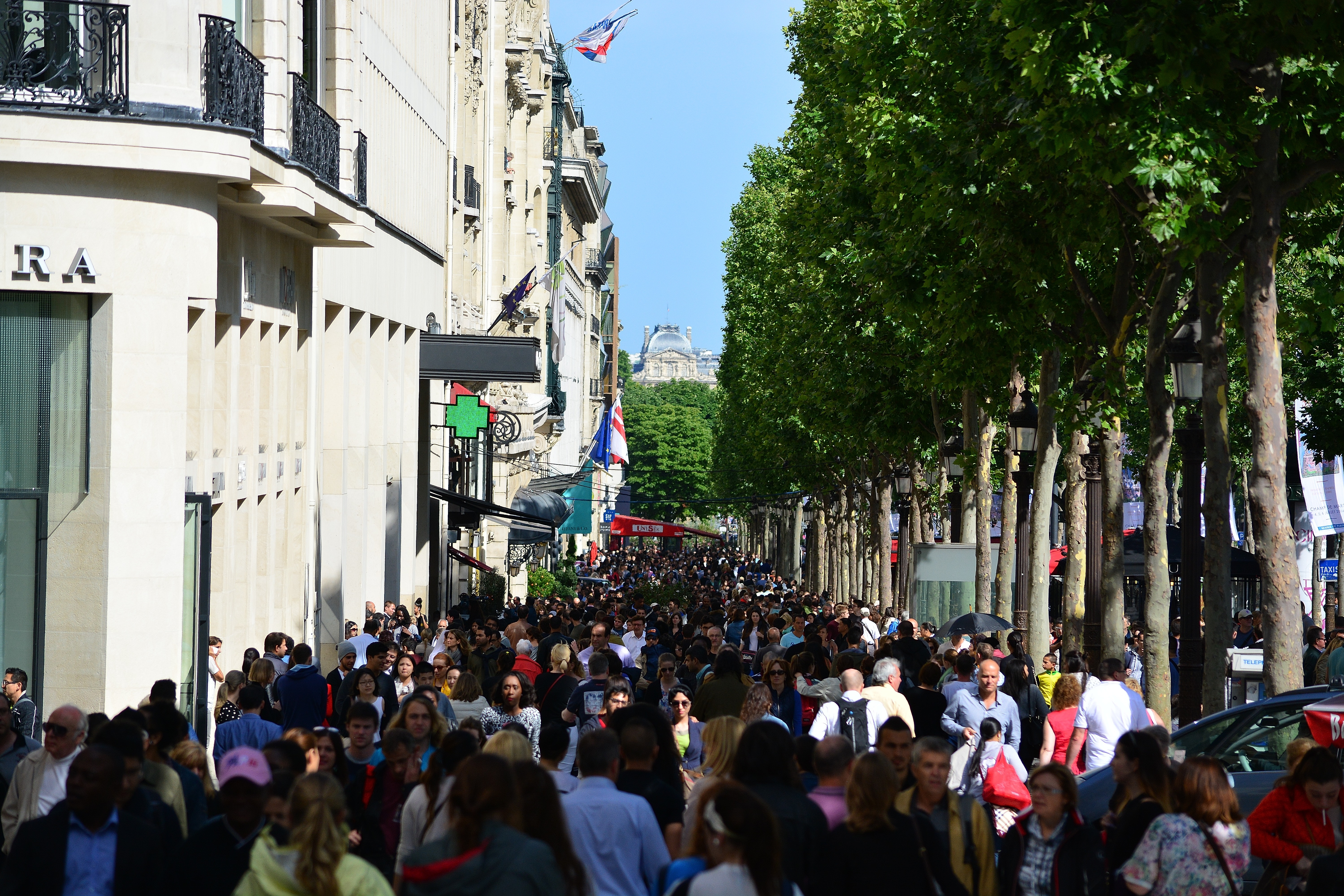 The Avenue des Champs-Élysées, Paris.